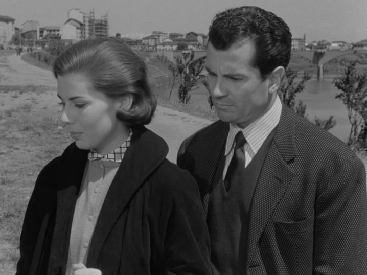 Gabriele Ferzetti and Madeleine Fischer in a scene of the film Le amiche